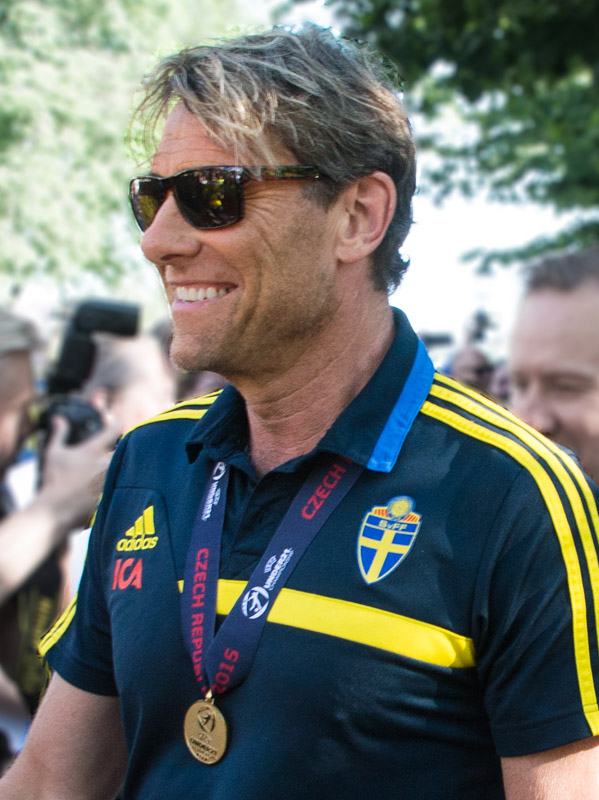 Håkan Ericson och U21-mästarna firas i Kungsträdgården i Stockholm den 1 juli 2015.